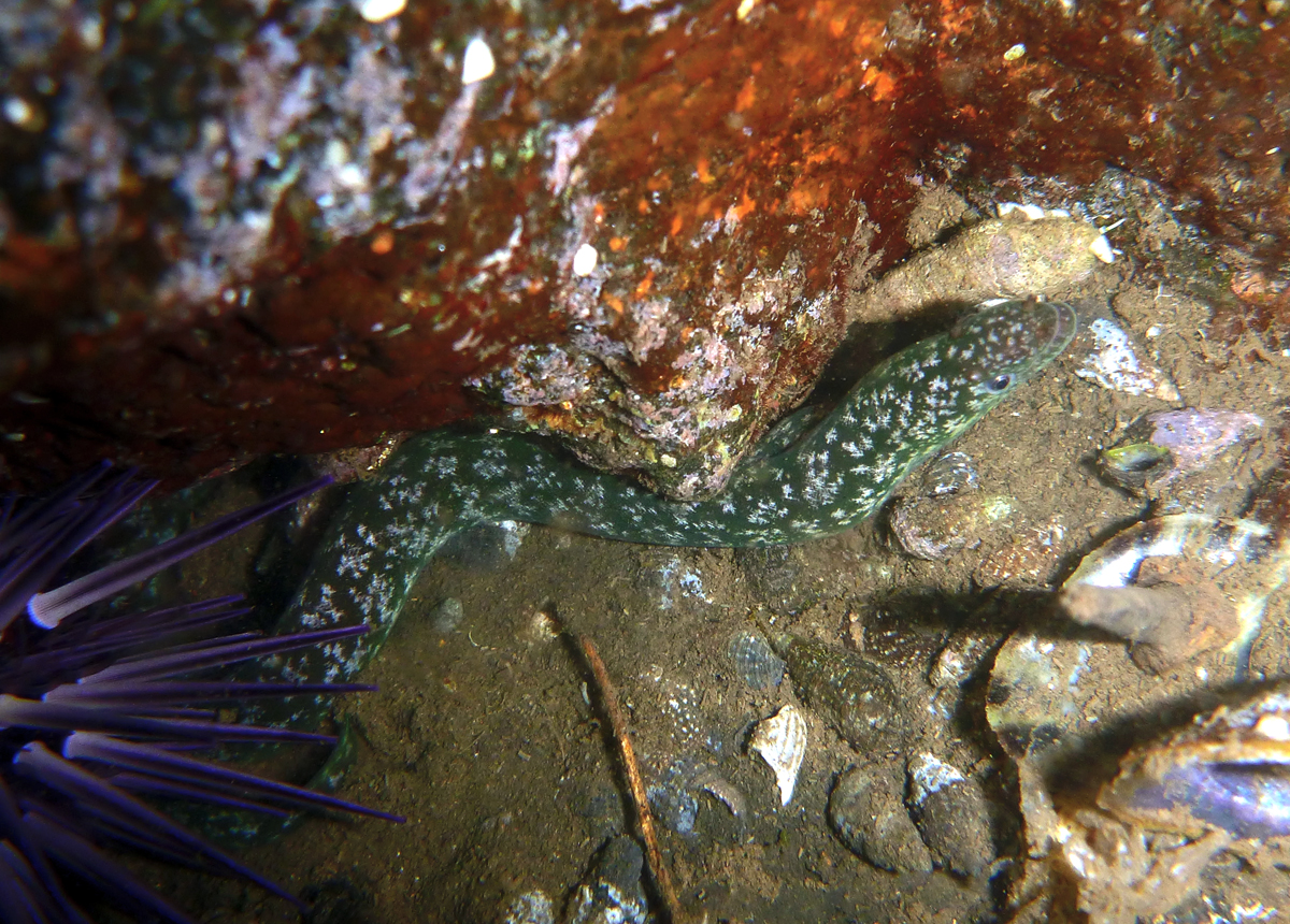 Uropterygius xanthopterus à la Réunion.